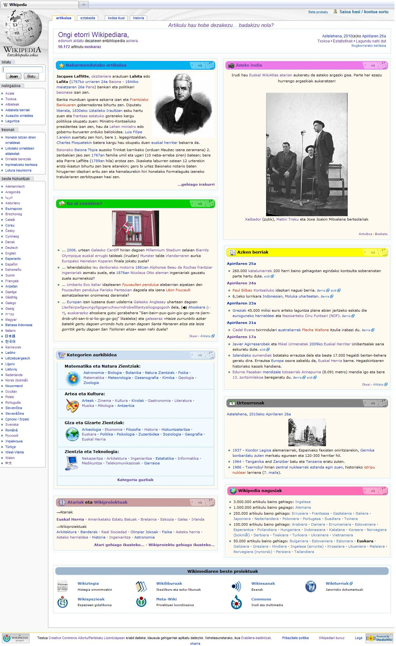 Euskarazko Wikipedia 2010eko apirilaren 26an / Basque Wikipedia in 26th April 2010